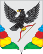 Герб Нерчинского района, Забайкальский край